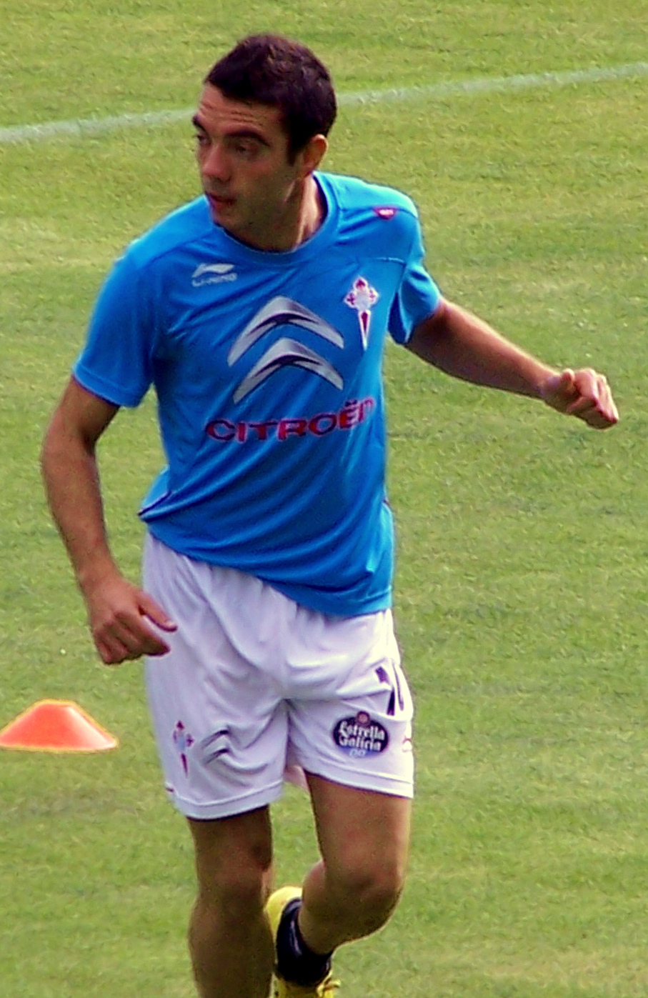 Iago Aspas, Celta Vigo striker